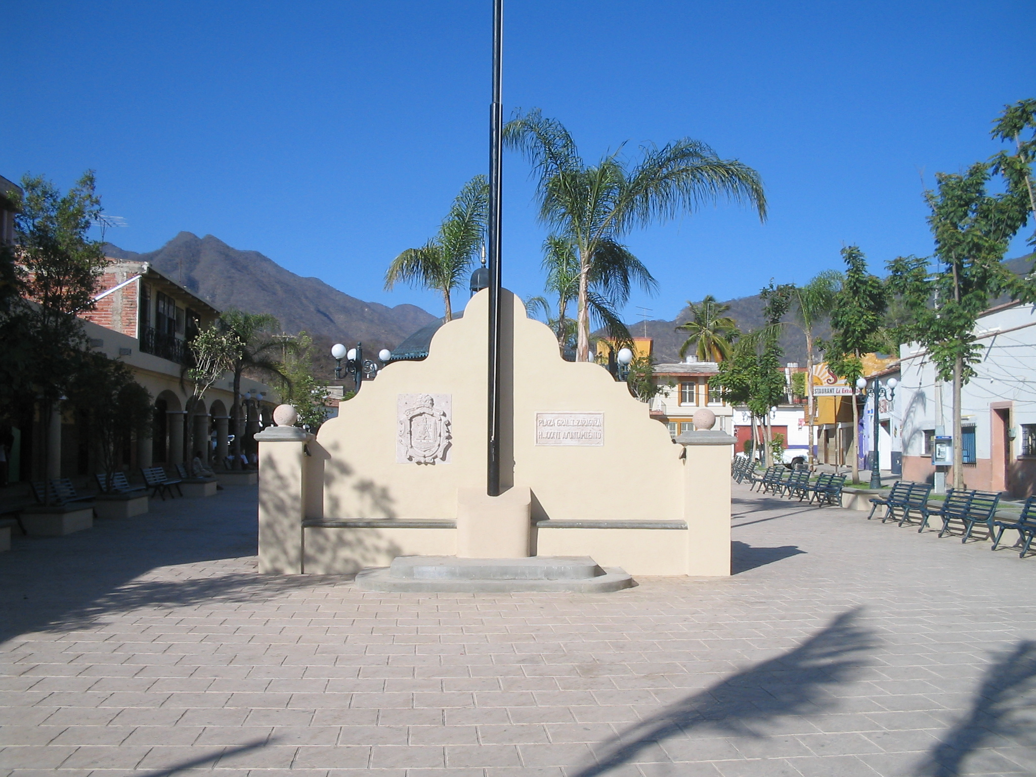 Plaza principal de Amatlán de Cañas, Nayarit.